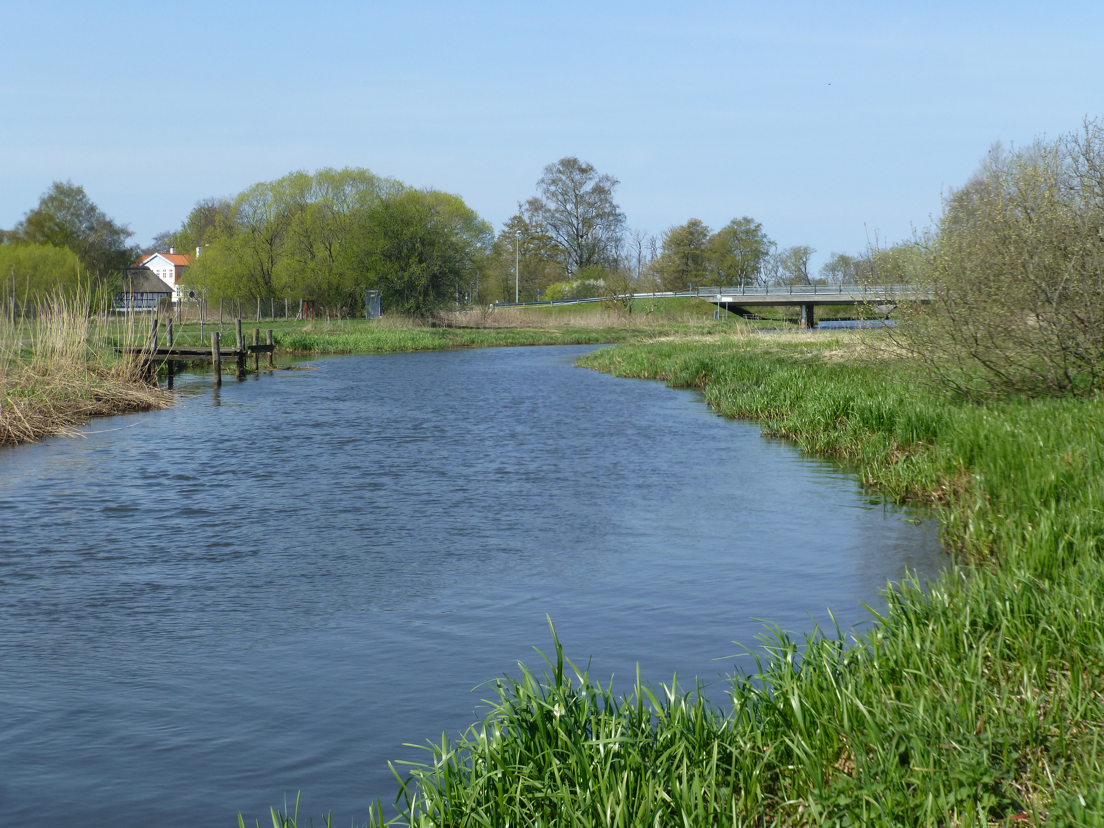 Nørreå ved Fladbro vest for Randers